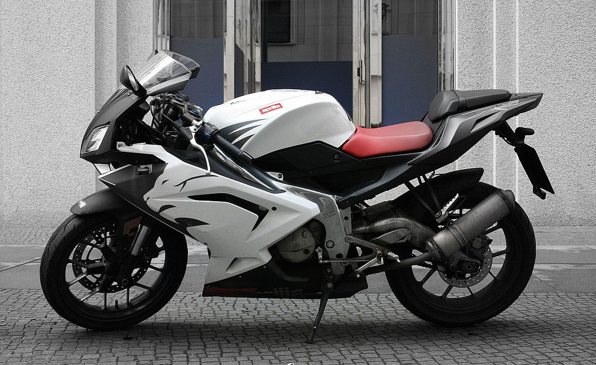 Aprilia RS125